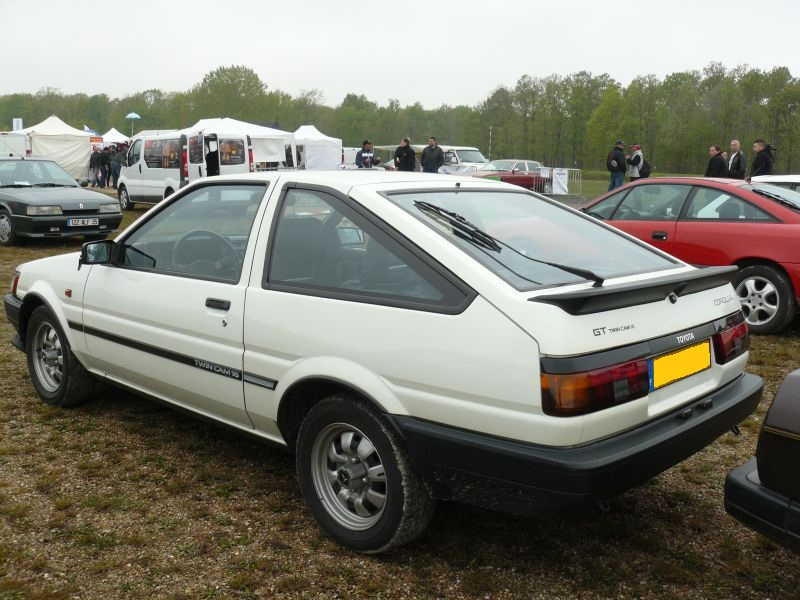 Français cadien: Montlhery Avril 2012